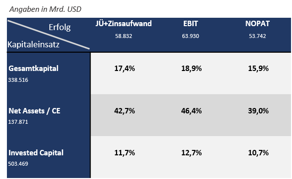 Renditen der Apple Inc.